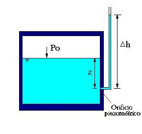 Autor: Alfredobi Fecha: abril 2006